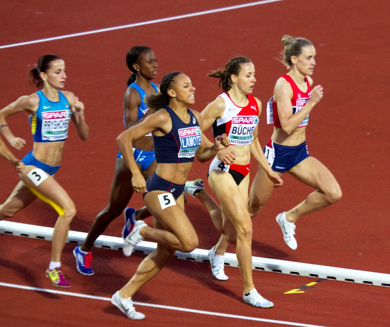 625 finale 800m dames